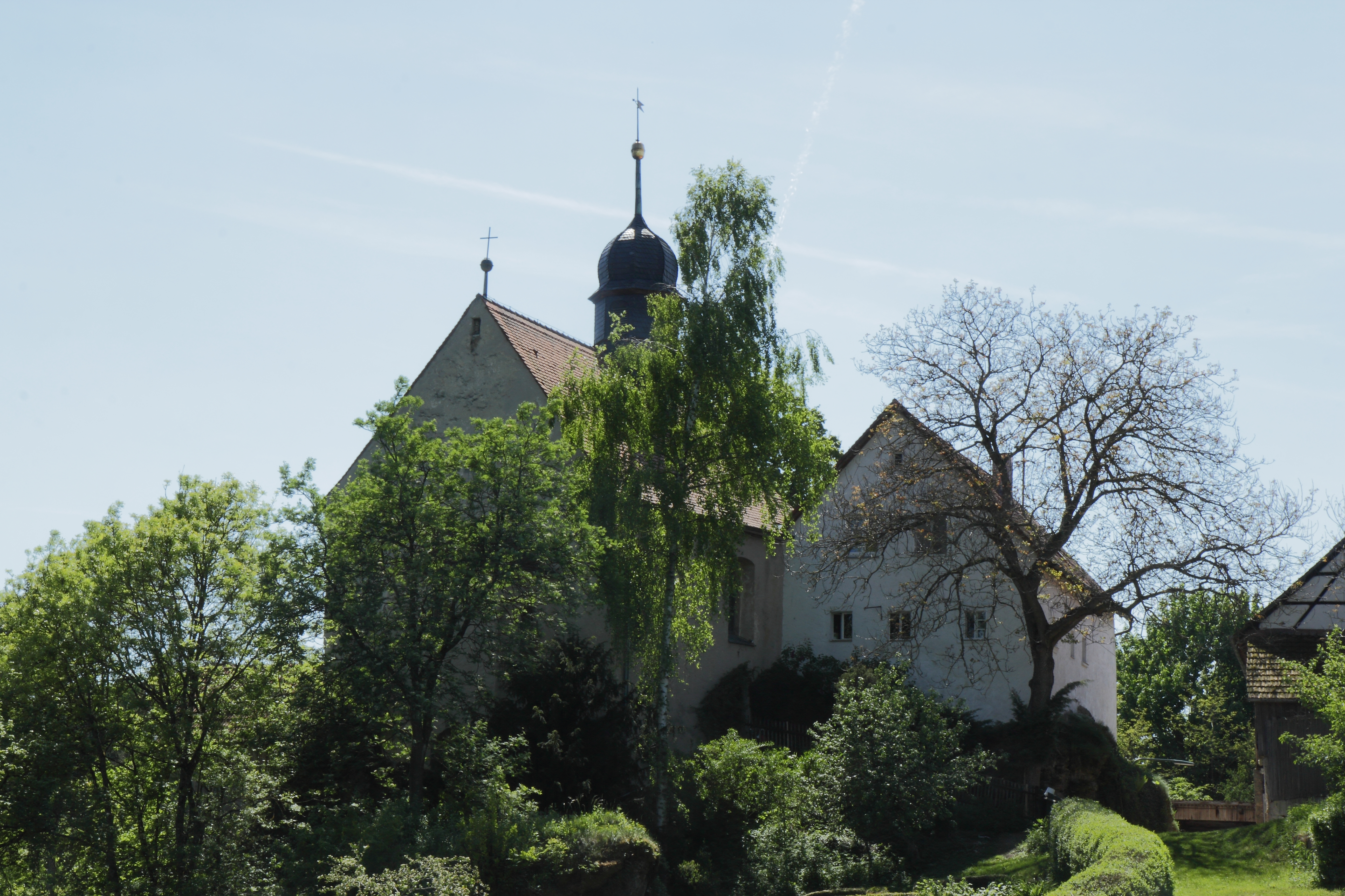 Burgstall Ahorn - Ansicht der Kapelle von Osten